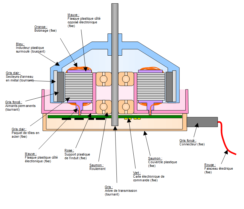 Schéma de fonctionnement d'un moteur sans balais à rotor externe